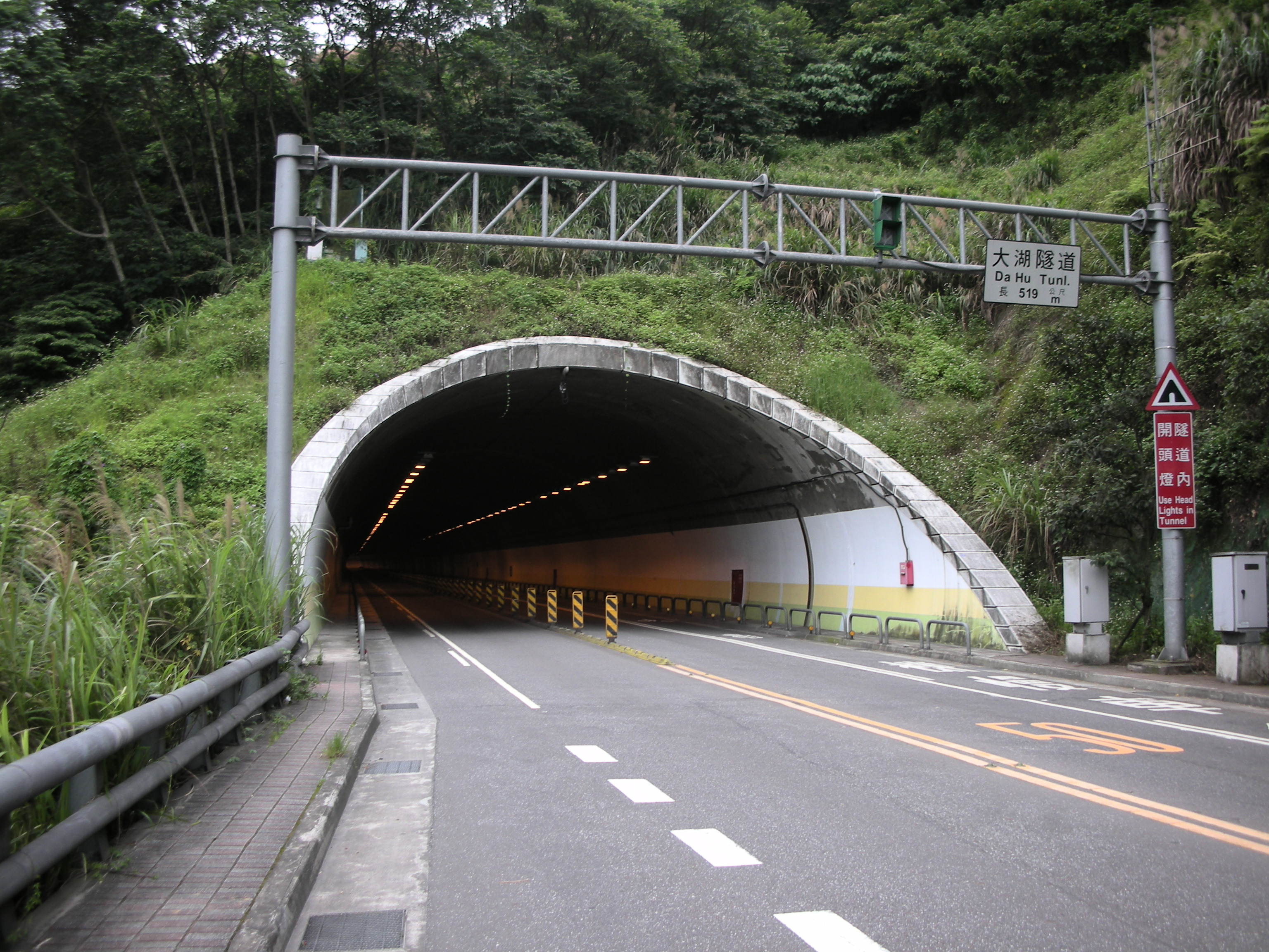 大湖隧道西北端入口